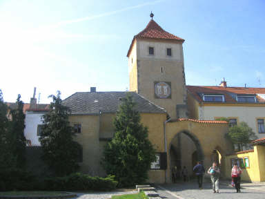 Ruĝa pordejo en ĉeĥa urbo Horažďovice.